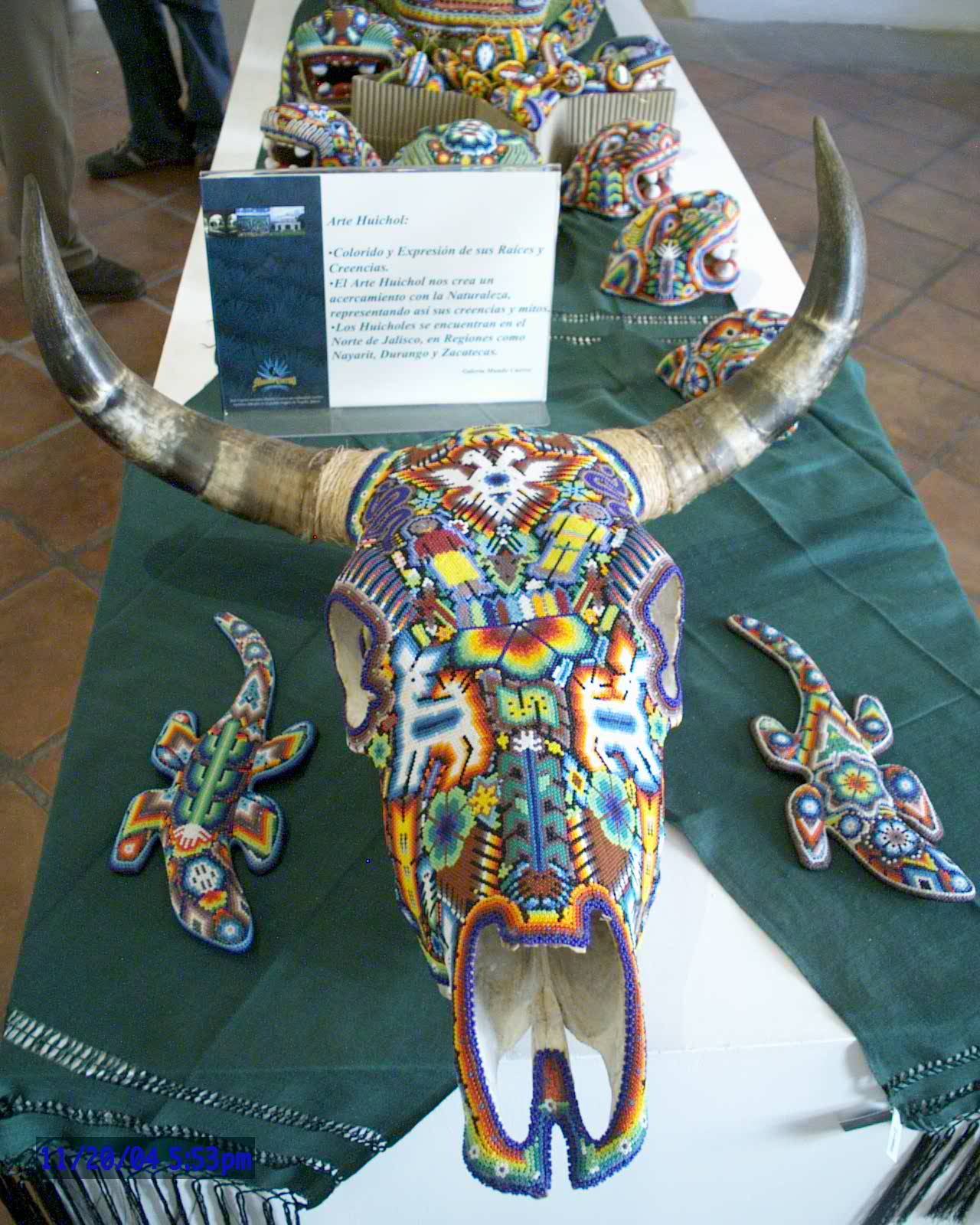 Huichol Trabajando, 20 Dic 2004 by Mario Jareda Beivide, Fotografias de Mexico